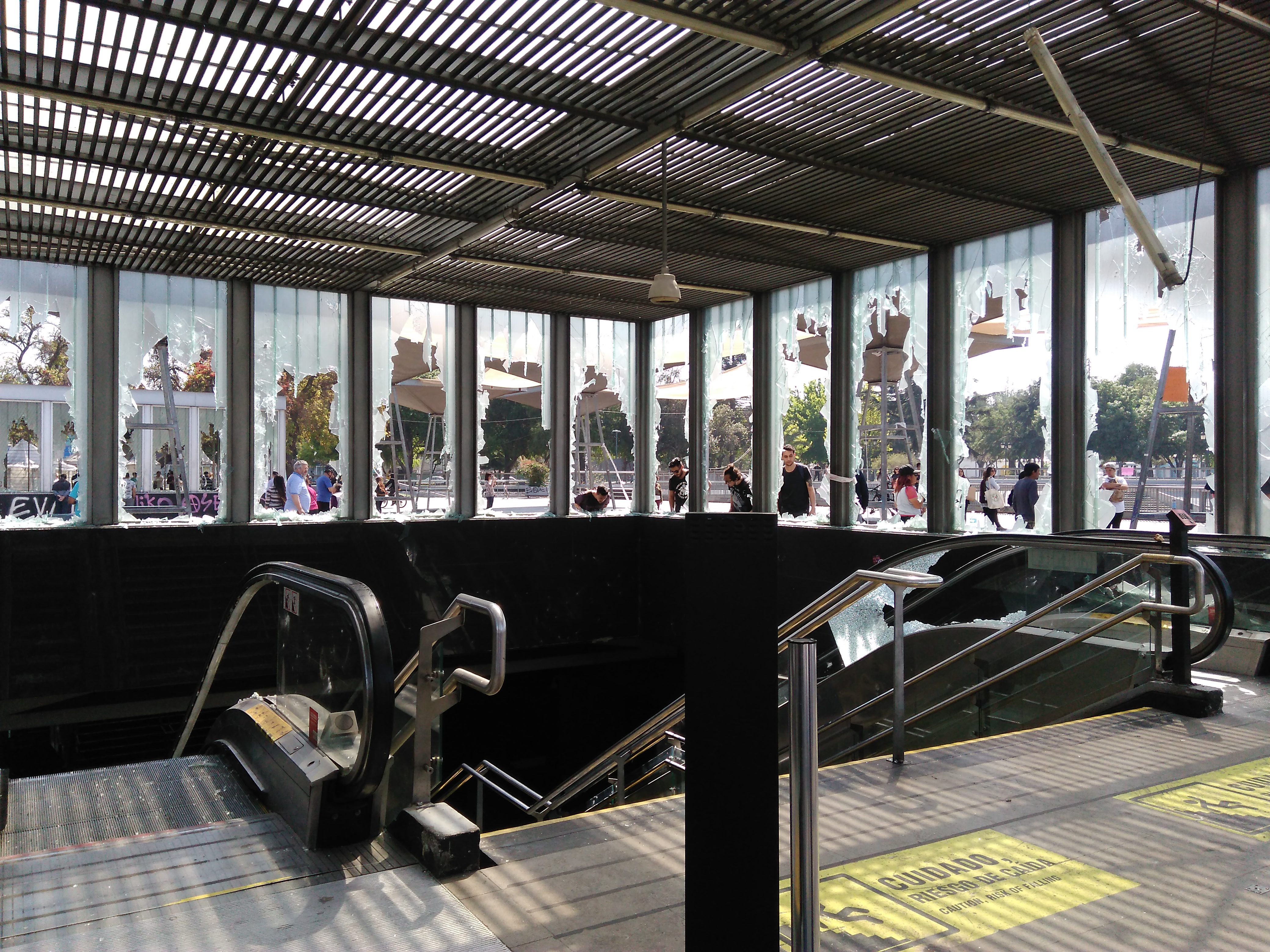 La estación de metro Plaza de Maipú destruida por vándalos durante la manifestación del 18 de octubre de 2019, gatillada por el alza en la tarifa del metro.